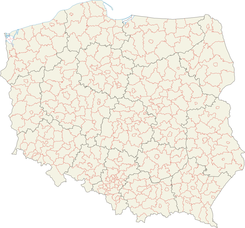 Mapa administracyjna Polski z zaznaczonymi granicami województw i powiatów, stan na 1 stycznia 2007. Autor: Aotearoa Administrative map of Poland with borders of województwa (voivodships) and powiaty (counties), as of January 1, 2007. By Aotearoa